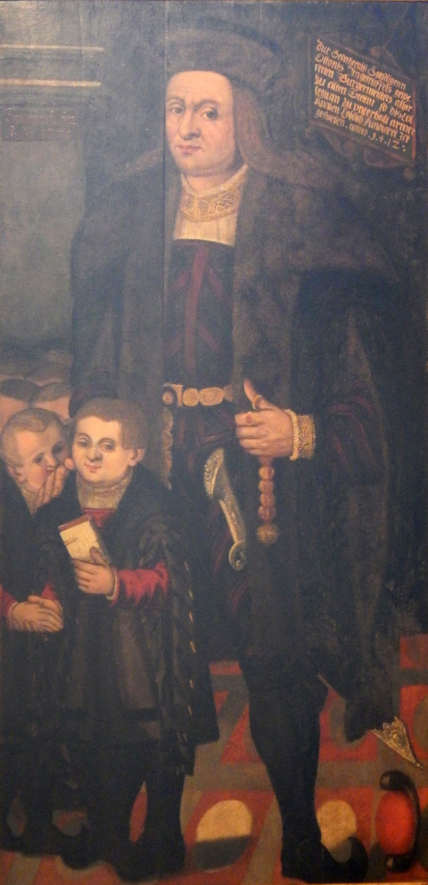 Ölgemälde von Otto Jageteufel aus dem Nationalmuseum Stettin, Abteilung Stadtgeschichte im Alten Rathaus.